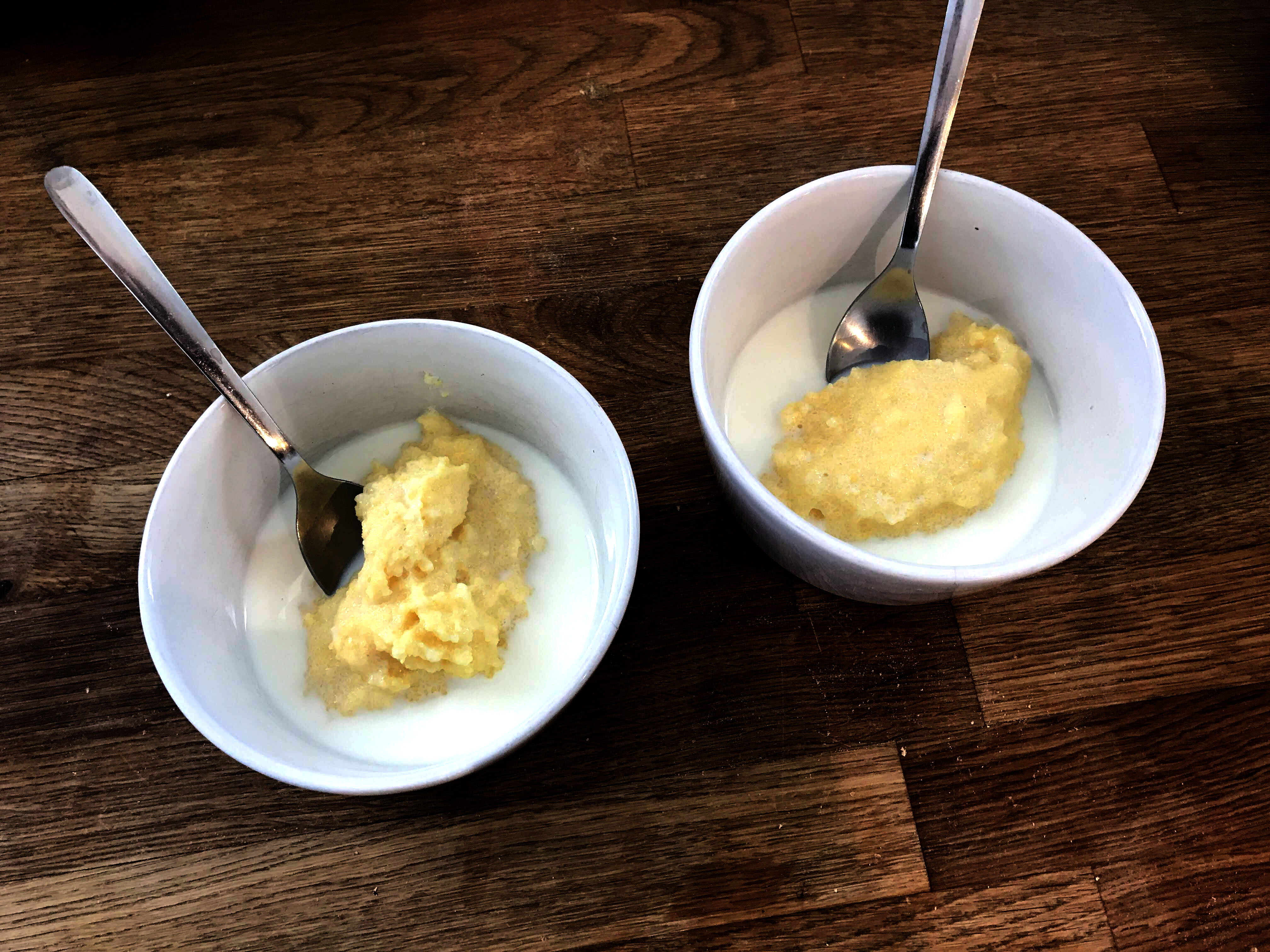 Morokila, arto-irin egosia esnetan